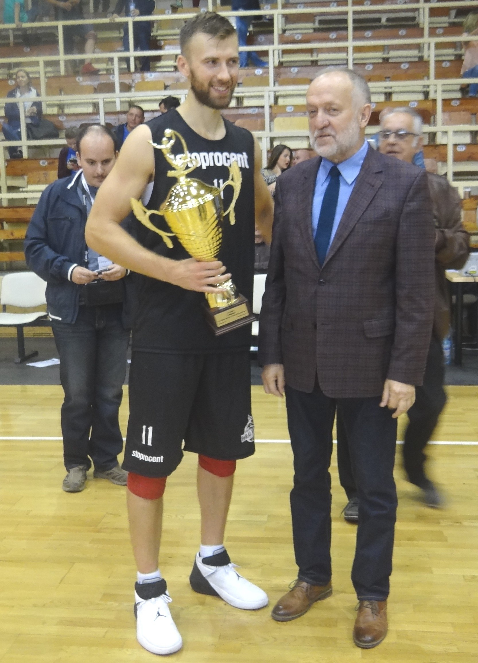 Paweł Kikowski MVP w meczu ze Spójnią (23.09.2018)